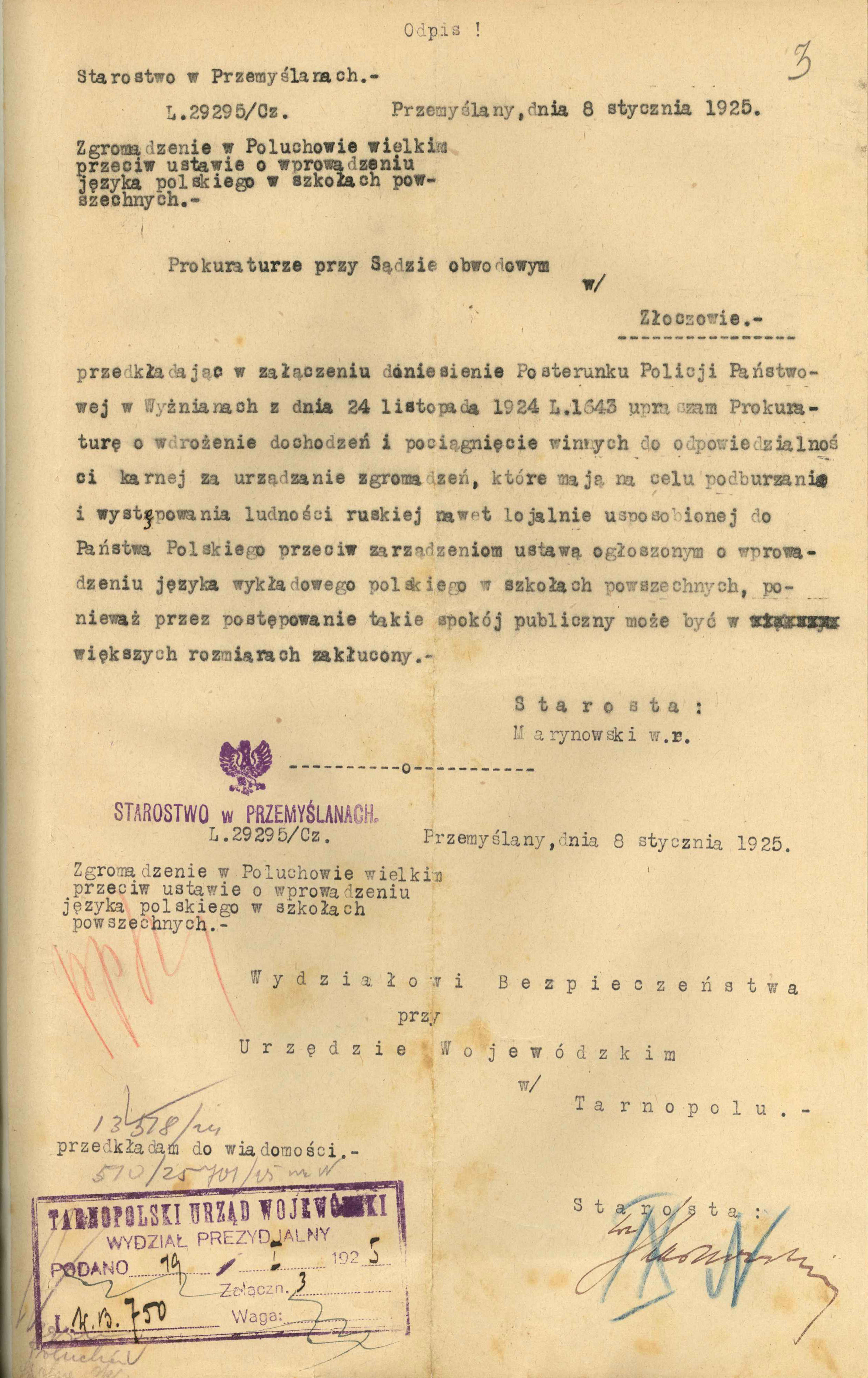 донос поліції, на зорганізуване зібрання 24.11.1924р, в В.Полюхові